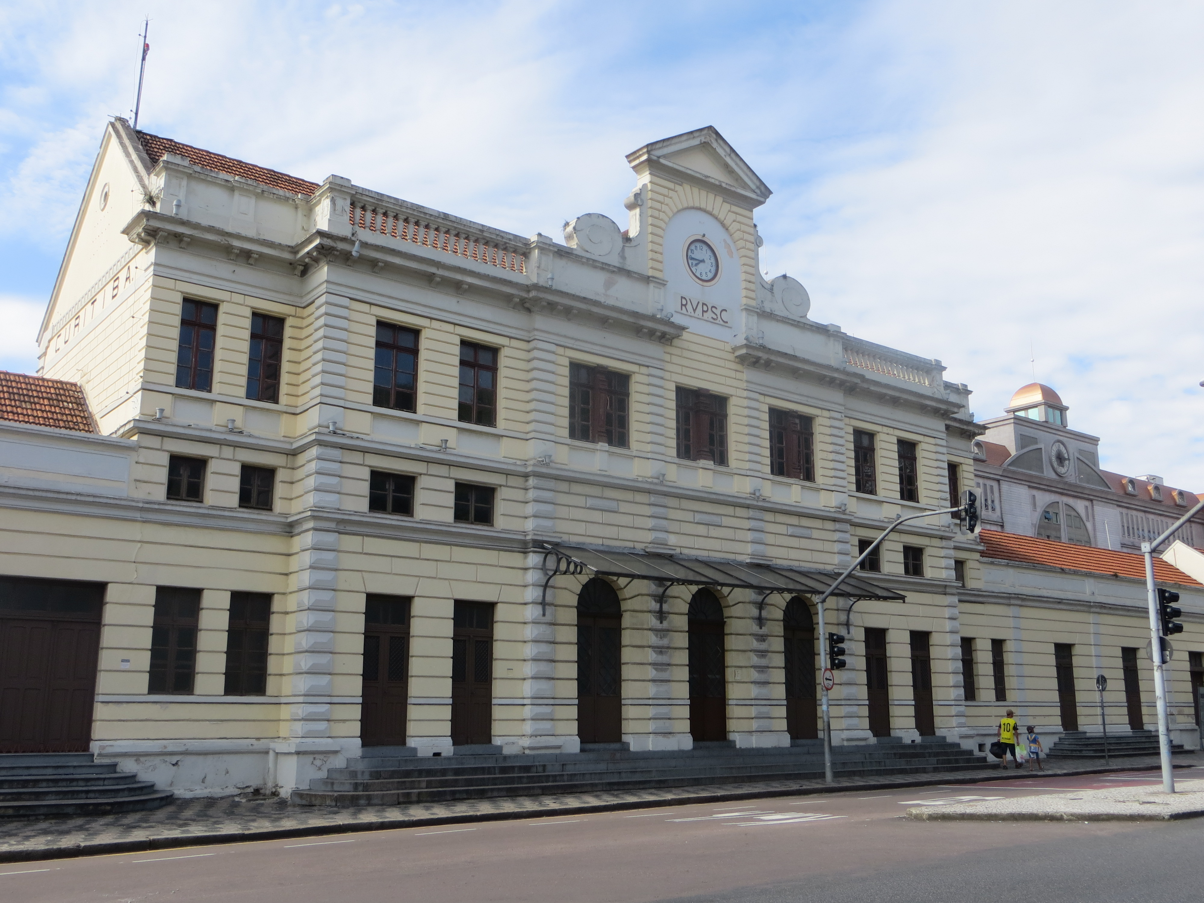 Antiga Estação Ferroviária de Curitiba que serviu com terminal de passageiros entre Curitiba e Morretes de 1885-1972.